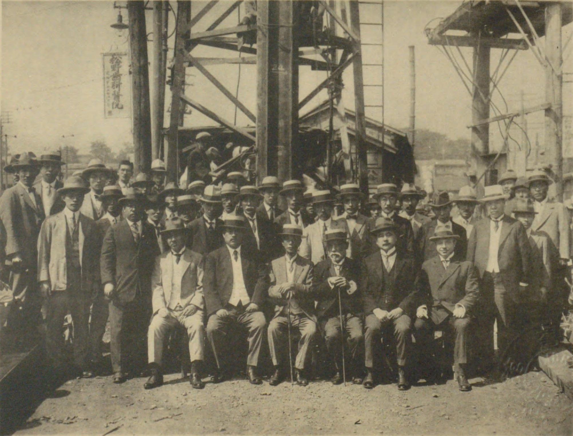 1925年（大正14年）9月27日に挙行された東京地下鉄道（現・東京地下鉄）銀座線上野浅草間の起工式の記念写真。座っている前列の右から、ルドルフ・ブリスケ、早川徳次、古市公威、野村龍太郎。